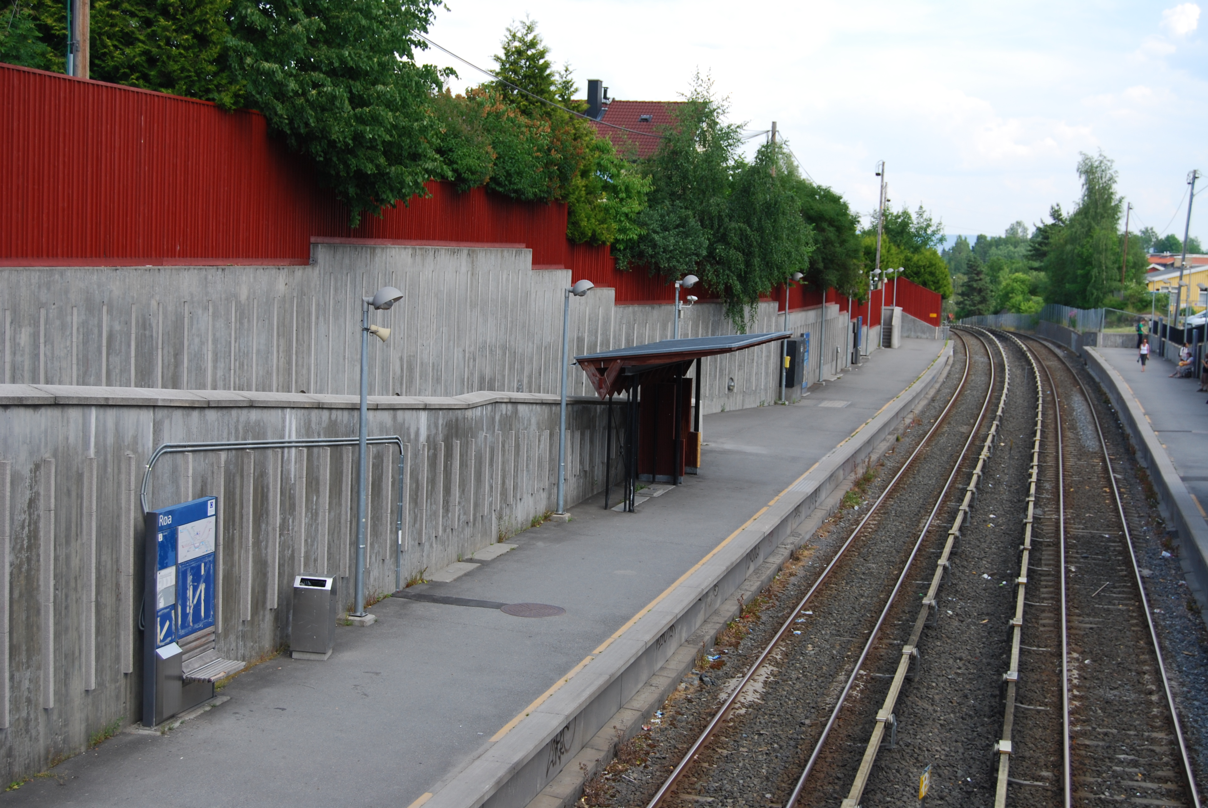 Røa stasjon (Oslo) 2009 r.